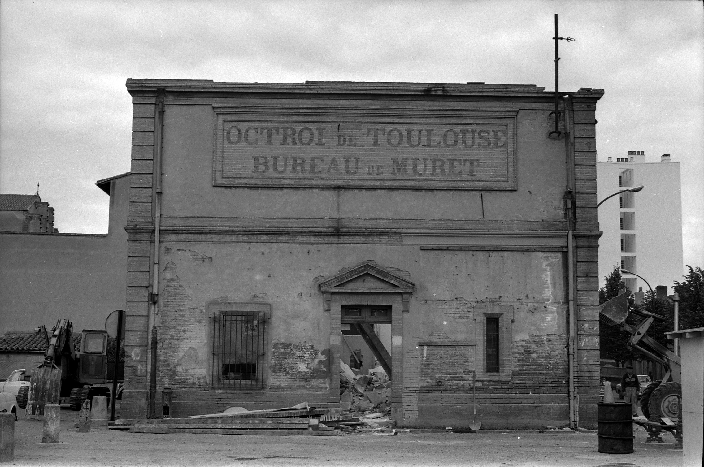 L'Octroi de Croix de Pierre. Le 19 Mai 1967. Vue de la démolition de l'Octroi de Croix de Pierre.